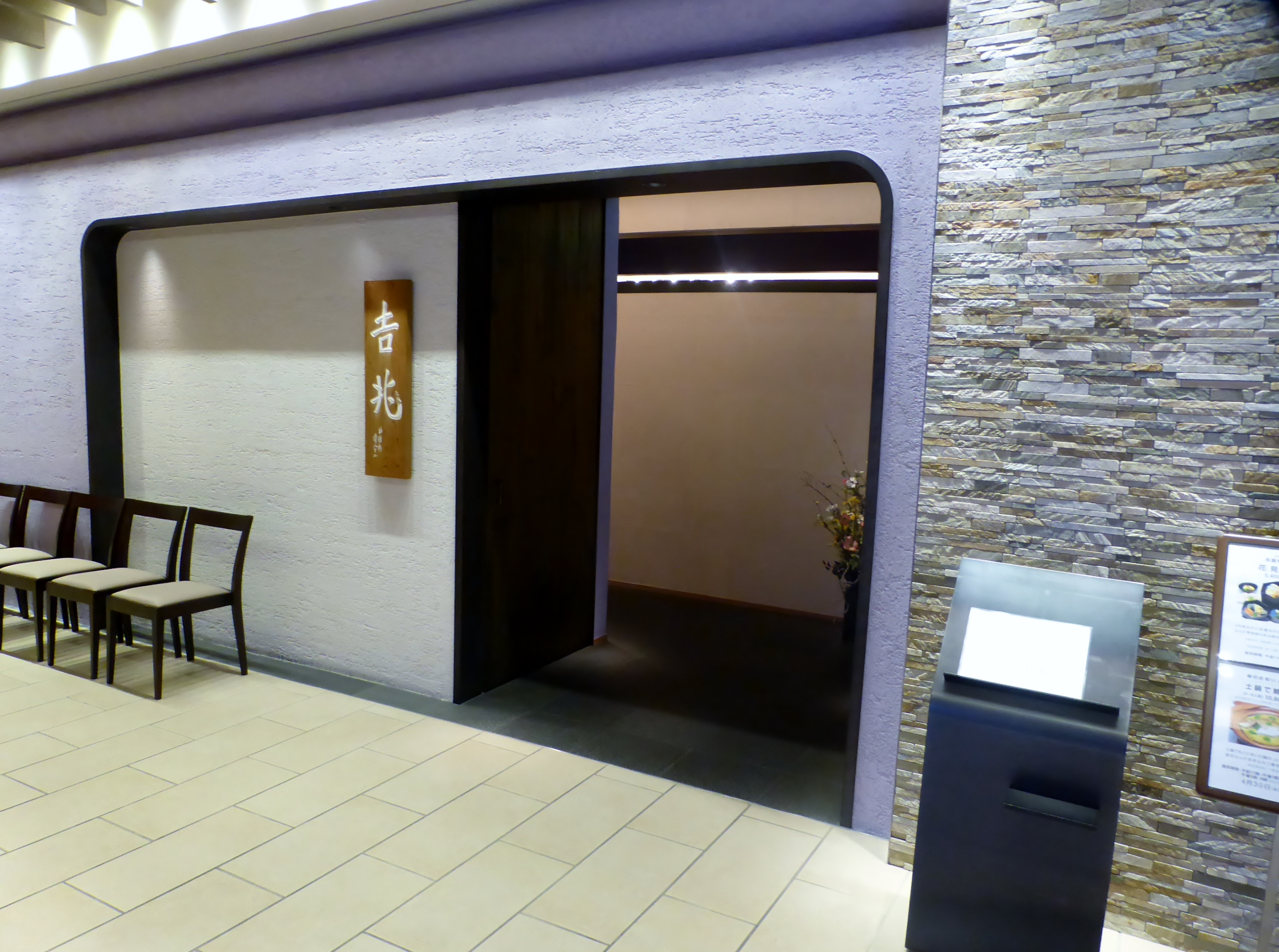 高麗橋吉兆を撮影。